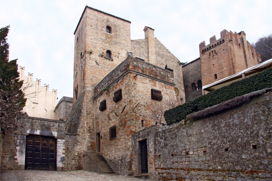 Ingresso al Castello di Monselice